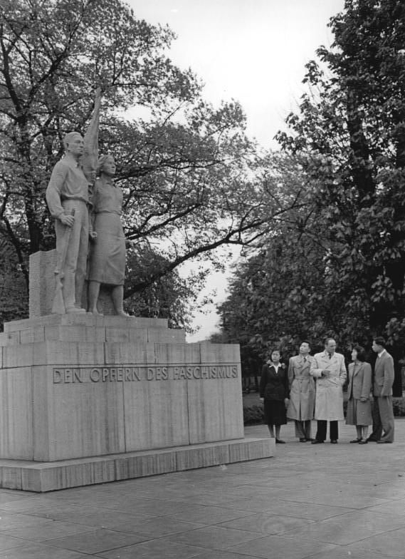 Gera, Auzubildene aus China, Freizeit Zentralbild Witting-Wehse 21.5.1955 - 2977- Chinesische Jungingenieure im VEB Kondensatorenwerk Gera Freundschaft verbindet das deutsche Volks mitdem chinesischen. Junge Deutsche studieren auf den Hochschulen Pekings, während chinesische Jungen und Mädchen auf deutschen Universitäten und in volkseigenen Betrieben lornen, die Wissenschaften und die Technik zu meistern. Seit Anfang dieses jahres absolvieren vier chinesische Jungingenieure im VEB KondensatorenwerkGera ihr Praktikum. Durch ihren Fleiß und ihren Lerneifer und ihre Hilfsbereitschaft sind sie Betrieb erworbenen Kenntnisse werden ihnen beim sozialistischen Aufbau ihrer Heimat helfen. U. B. z. Ein Spaziergang während der Mittagspause mit dem Werkleiter Kollegen Ehrlich, der die patenschaft über die chinesischen Freunde übernommen hat. Am Ehrenmal der Opfer des Faschismus im Stalinpark. Information added by Wikimedia users. (Bildhauer: Karl Kuhn und Otto Oettel)